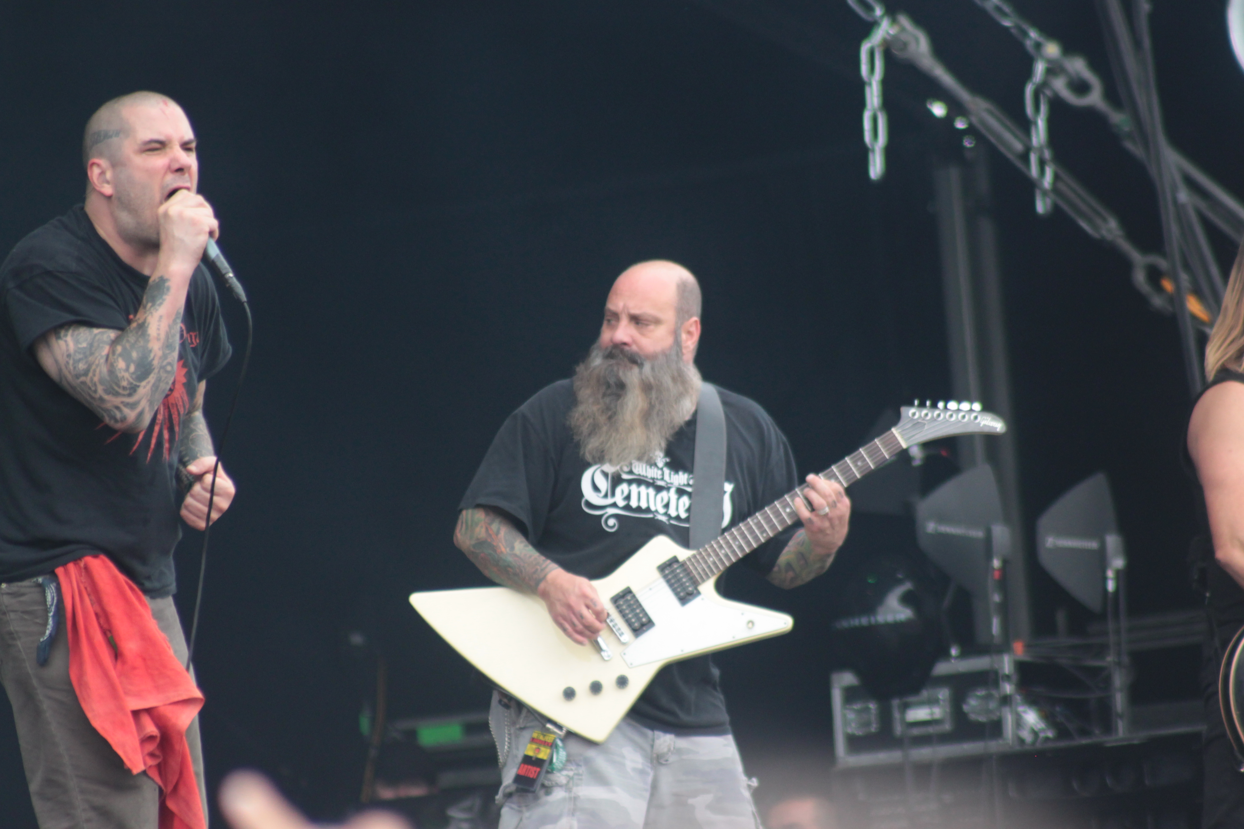 Phil Anselmo et Kirk Windstein, Down, Hellfest 2013, Fr-44-Clisson.